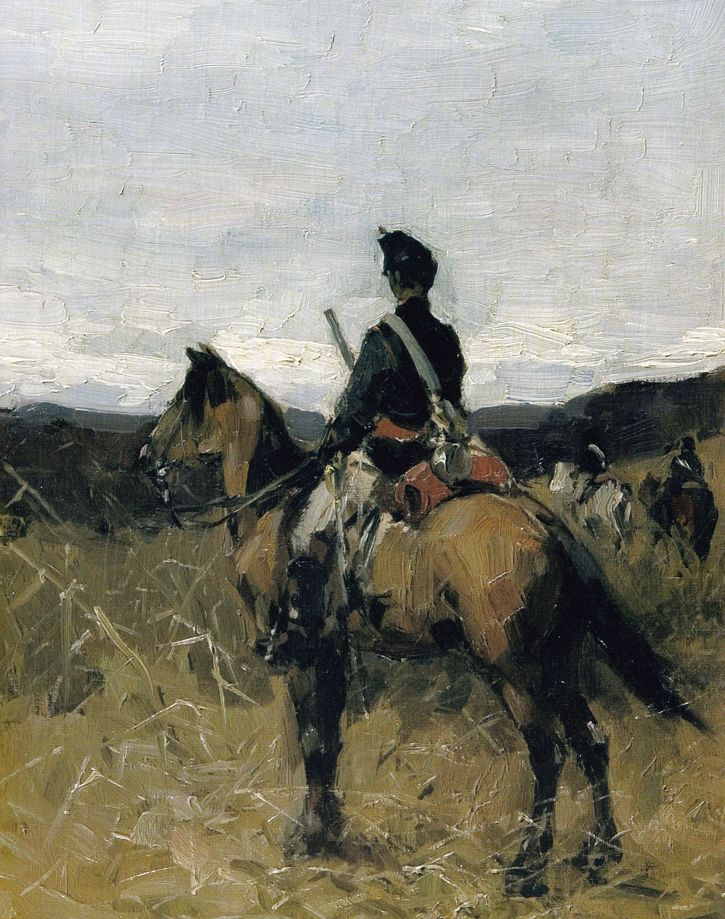 Roșiorul, ulei pe pânză, 40x33cm, Semnat stânga jos cu roșu: Grigorescu - Galeria de Artă Românescă a Muzeului Național de Artă al României.